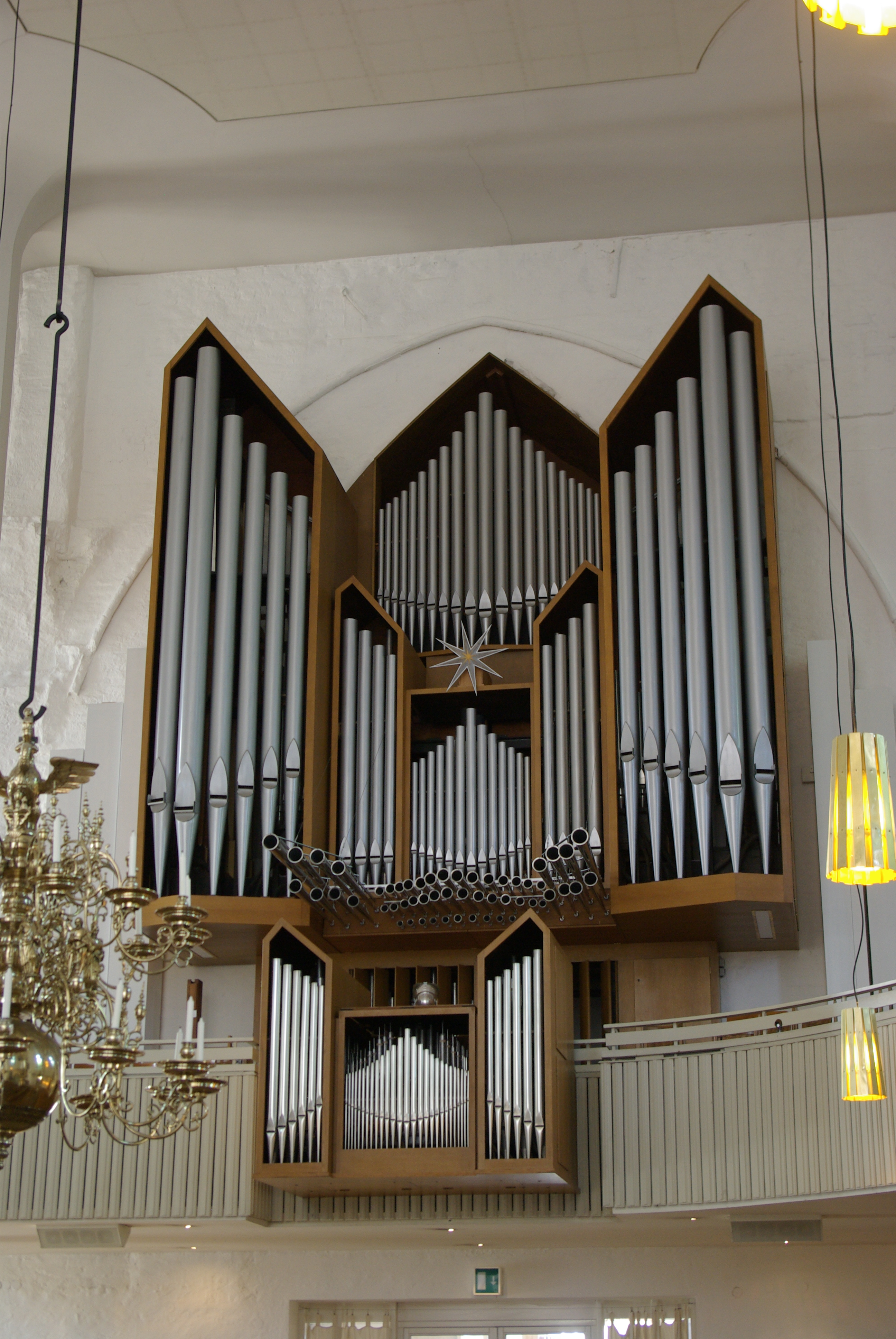 Kiel in Schleswig-Holstein. Die Hauptorgel der Kirche wurde 1965 erbaut.